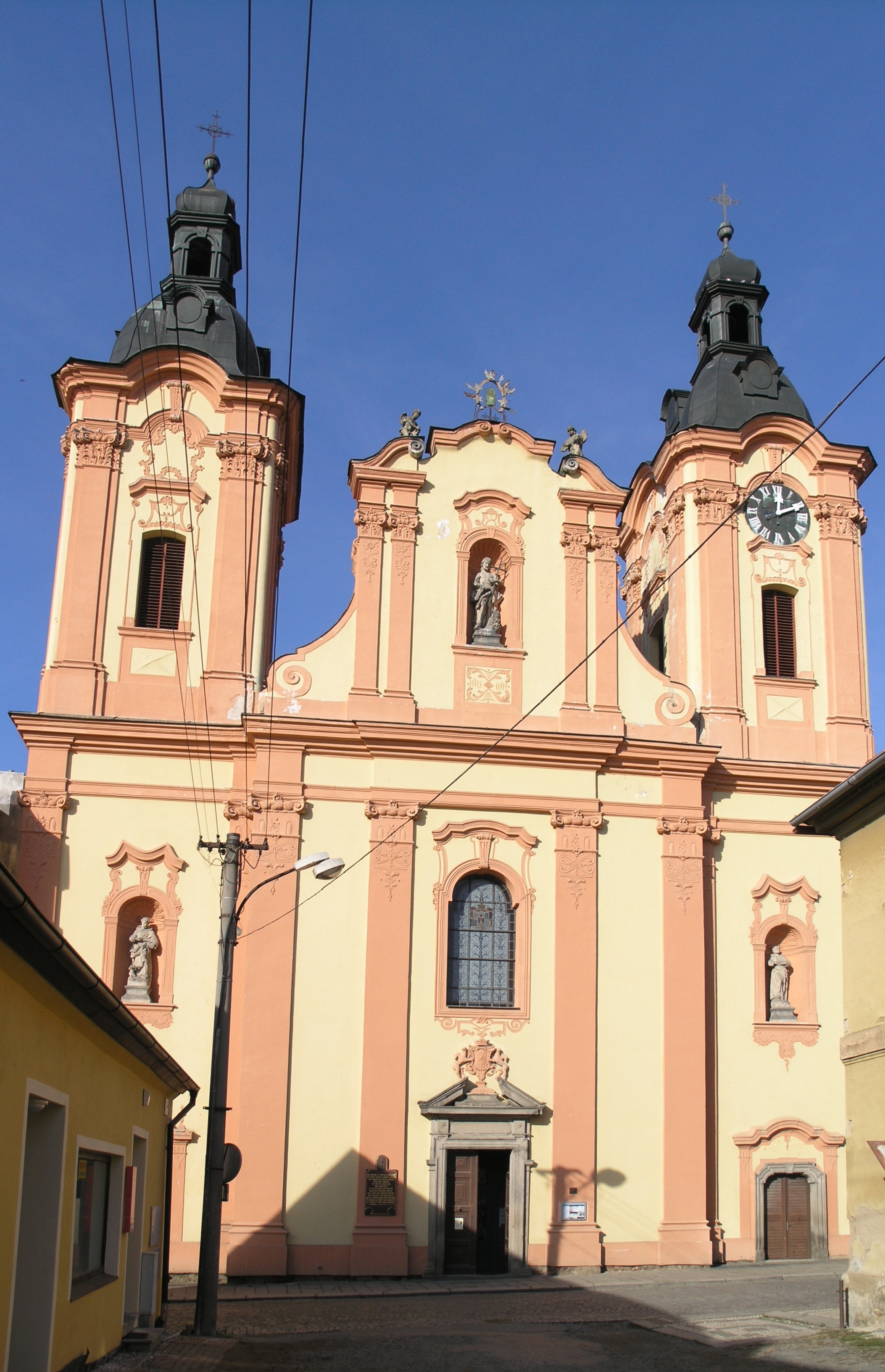 Nepomuk